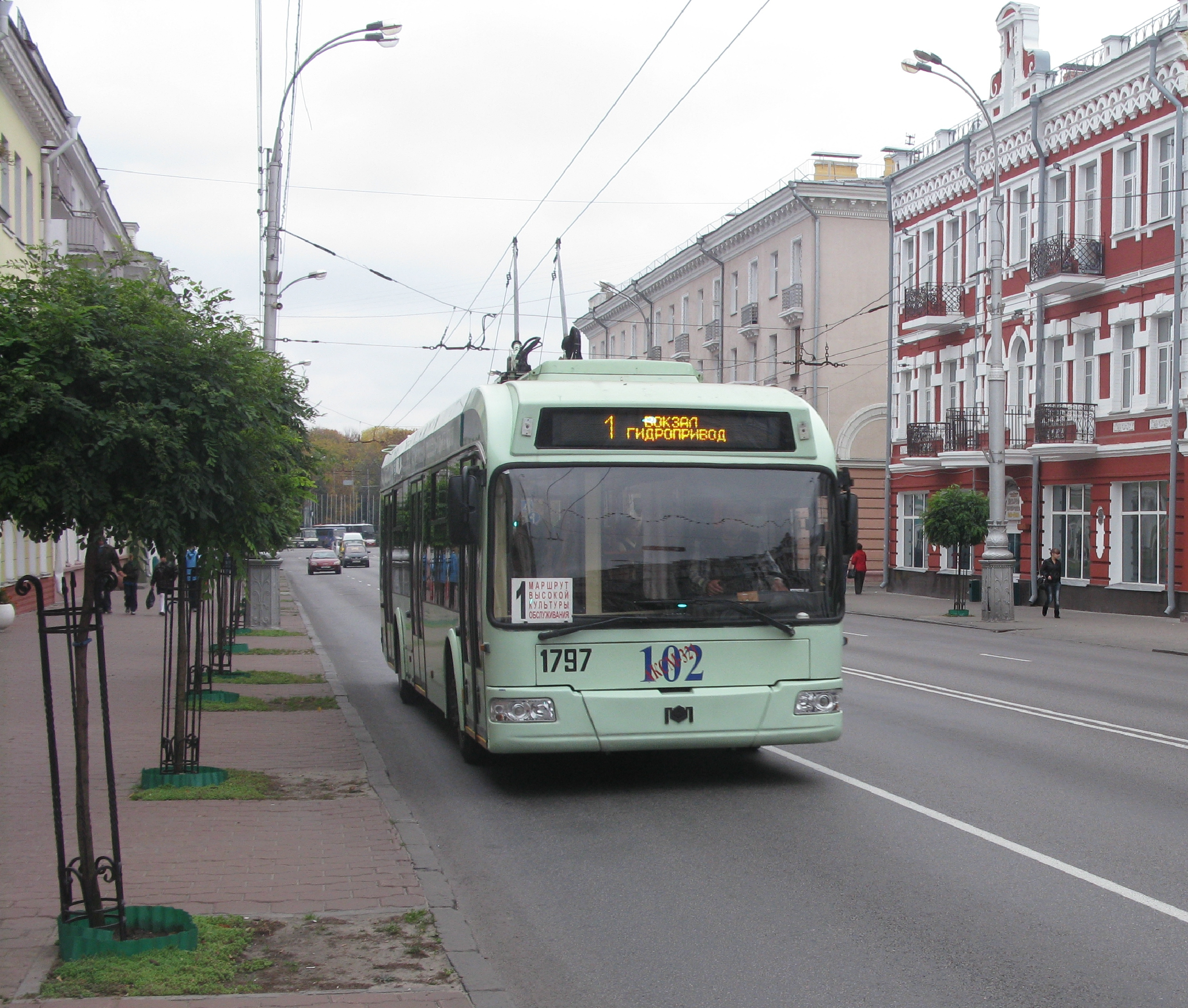 АКСМ-321 на улице Трудовой в Гомеле.